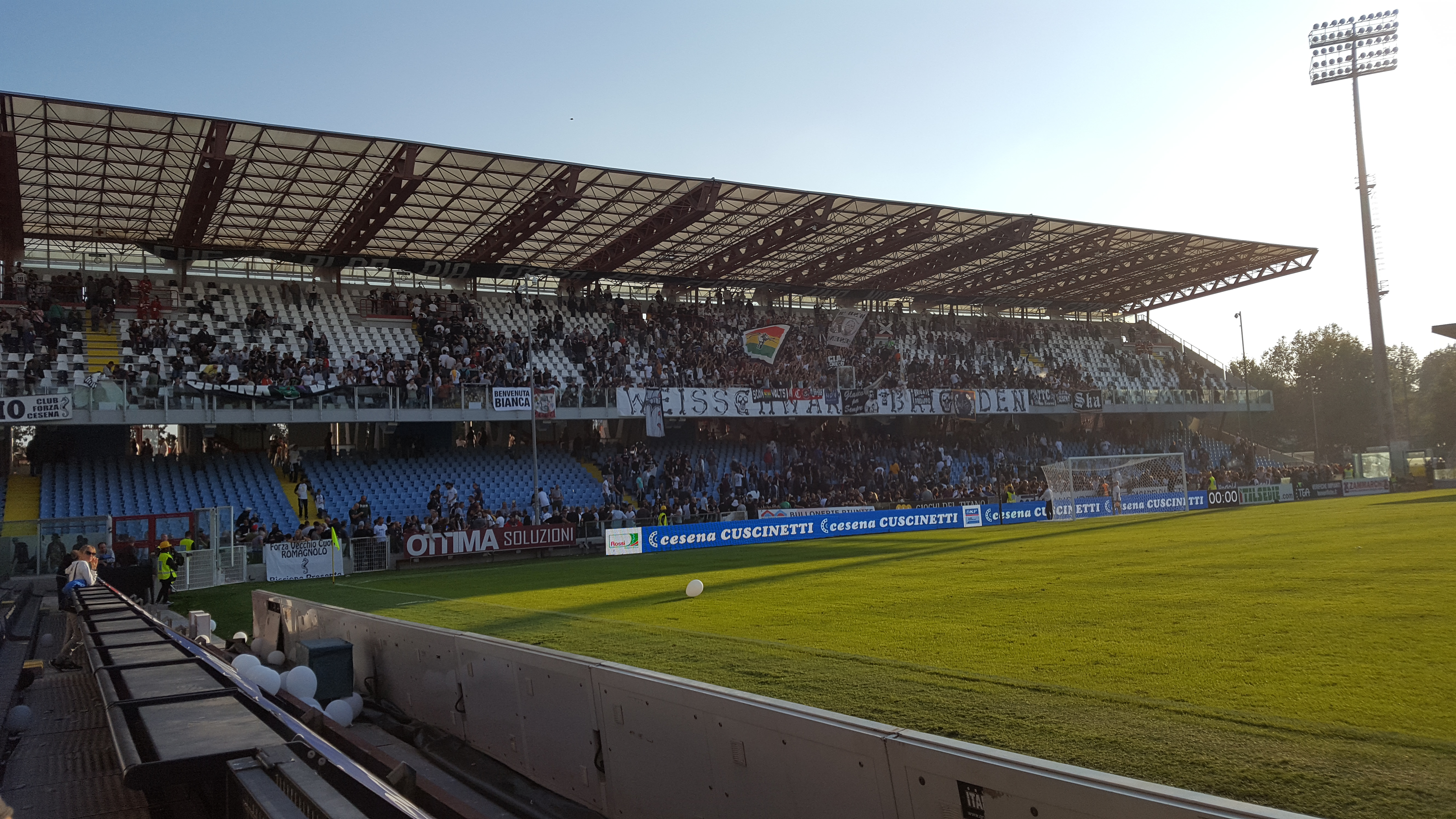 Vista dai distinti curva mare